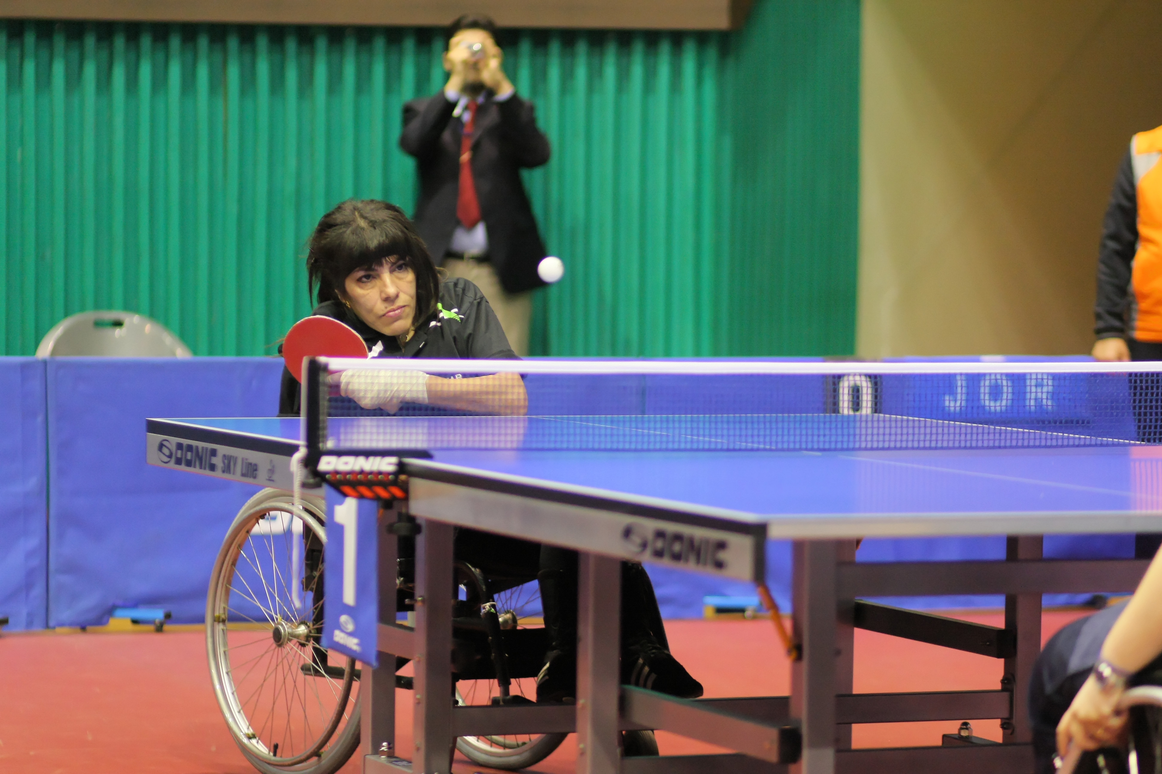 Maha Al Bargouti (JOR)